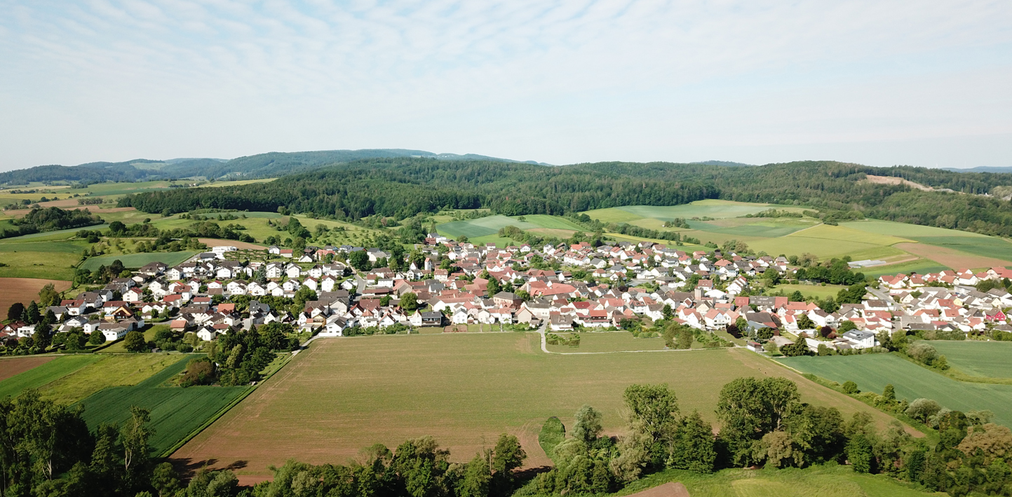 Luftbild von Wersau. Im Vordergrund die Gersprenz. Im Hintergrund die Neunkirchner Höhe.